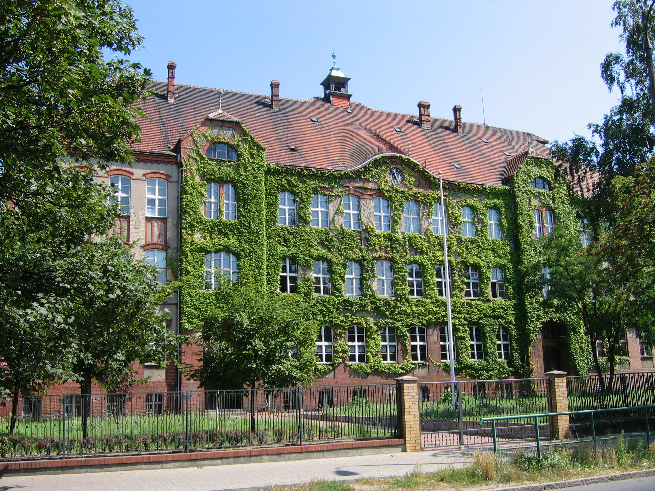 Gorzów Wielkopolski, ul. Przemysłowa 22 - szkoła z 1905 r., obecnie II Liceum Ogólnokształcące (zabytek nr L-33)